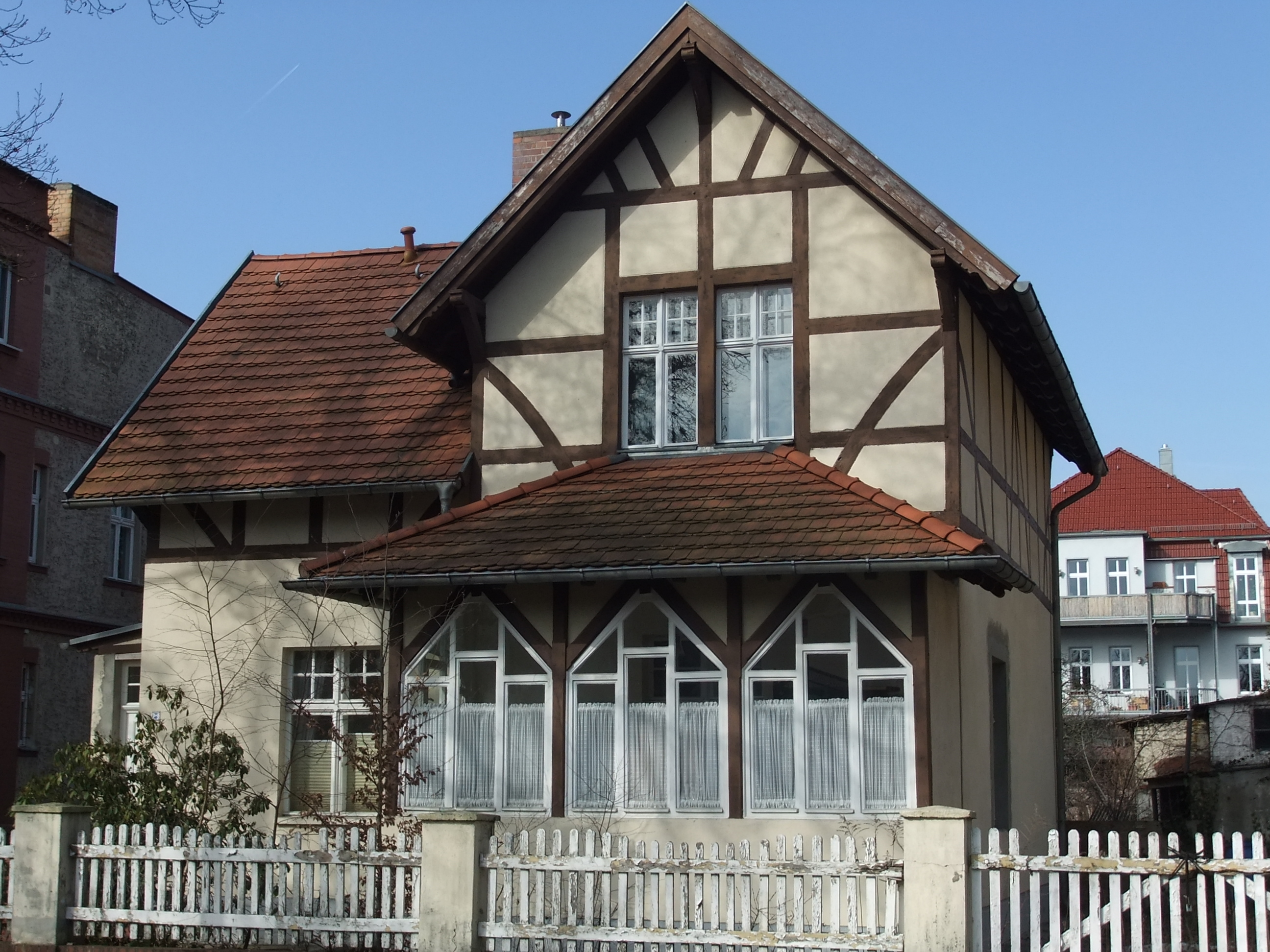 Denkmalliste Berlin OBJ-Dok-Nr.: 09085104 – Berlin Karlshorst Lehndorffstraße 10, Siedlungshaus, 1895 (Baudenkmal, Bestandteil des Ensembles Lehndorffstraße 3, 7-8, 10, Siedlungshäuser, Denkmalliste Berlin OBJ-Dok-Nr.: 09085100)